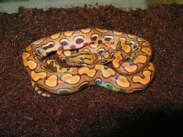 epicrates cenchria cenchria female